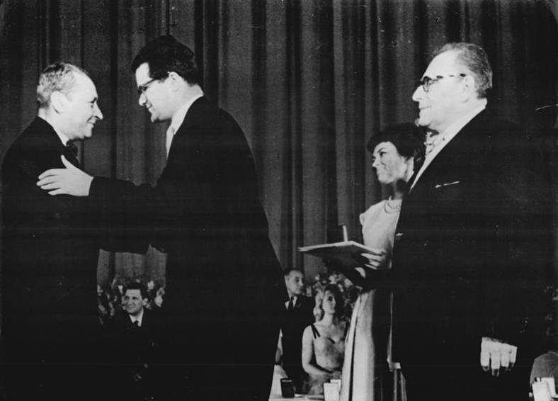 Zentralbild TASS Ka 24.7.61Moskau: Abschlussfestveranstaltung des II. Internationalen Filmfestivals - Goldmedaille für "Professor Mamlock". Mit einer Goldmedaille wurde der DEFA-Spielfilm "Professor Mamlock" bei der feierlichen Preisverleihung am 23.7.1961 in Moskau gewürdigt. UBz. Der sowjetische Regisseur und Vorsitzende der Jury Sergei Jutkewitsch (links) beglückwünscht den Regisseur Konrad Wolf (2.v.l.) zur Auszeichnung mit der Goldmedaille. Nationalpreisträger Wolfgang Heinz (rechts)."